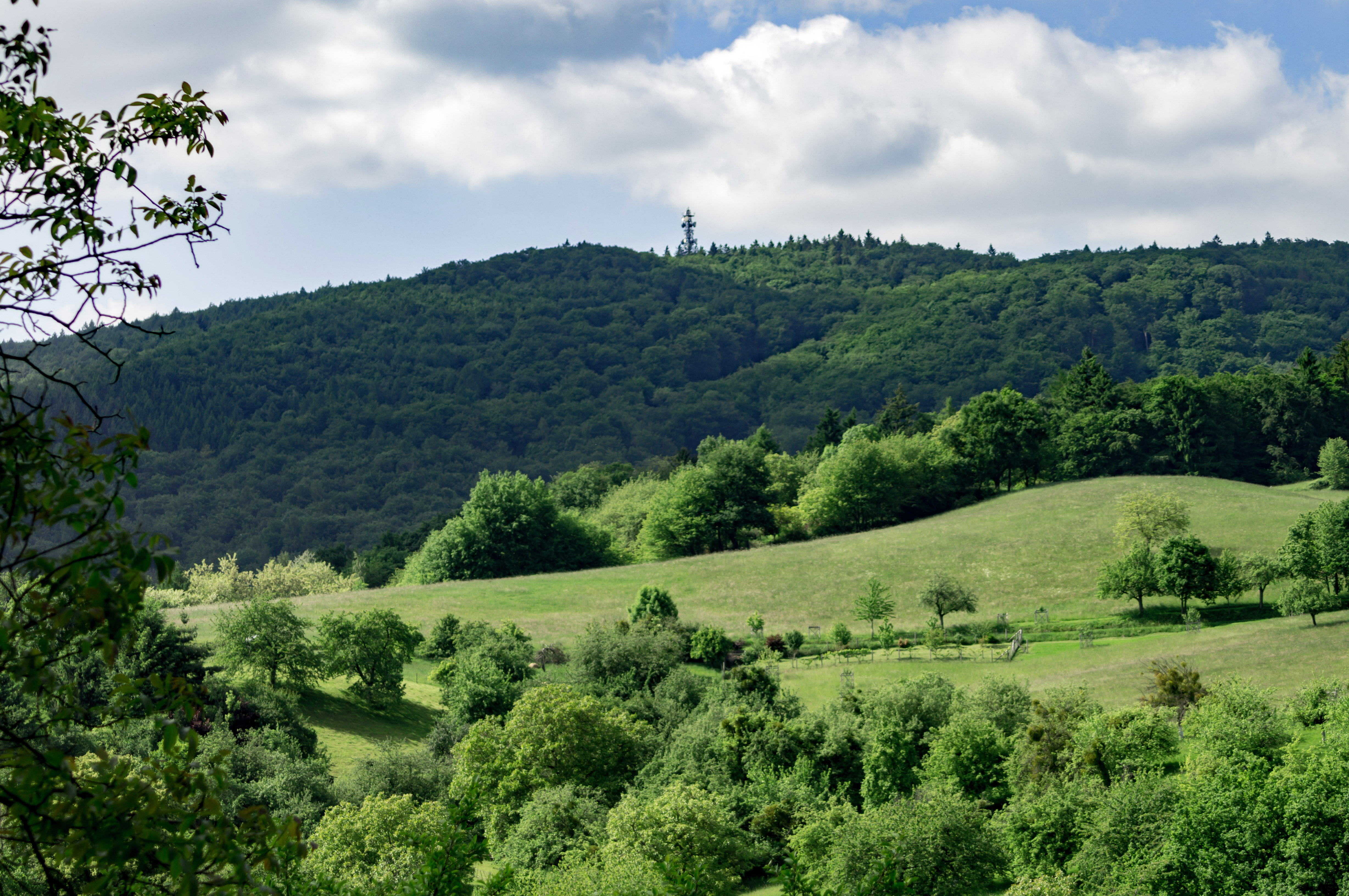 Naturschutzgebiet „Felsberg bei Reichenbach“ (NSG 1431001) in Hessen; Blick Richtung Felsberg mit Felsenmeer und Funkmast. Der Ohlyturm ist nicht zu erkennen, da zu niedrig und von den Bäumen verdeckt.